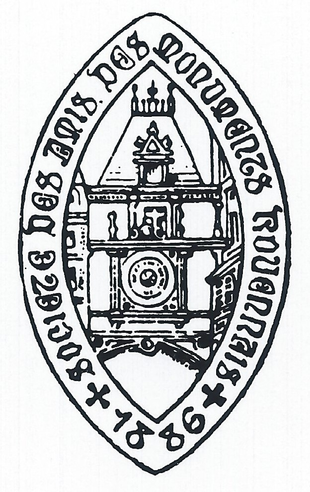 Logo de la Société des Amis des Monuments Rouennais, fondée en 1886.